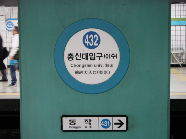 서울 지하철 4호선 총신대입구역 명판